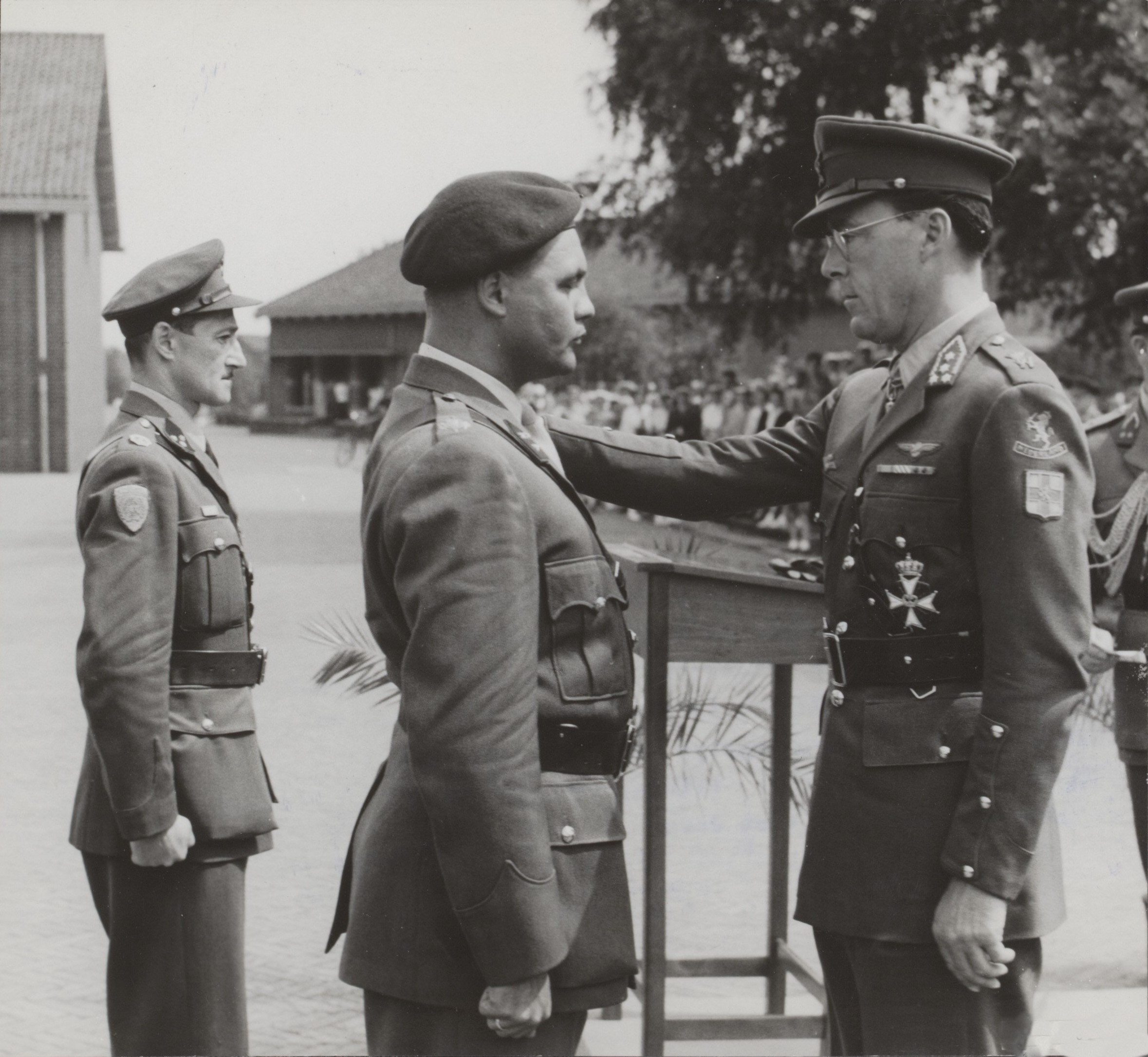 Collectie / Archief : Fotocollectie Elsevier Reportage / Serie : [ onbekend ] Beschrijving : Uitreiking ridderorde door prins Bernhard aan kapitein J.H.C. Ulrici te Vught Datum : 12 juli 1955 Locatie : Noord-Brabant, Vught Trefwoorden : koninklijk huis, officieren, onderscheidingen, uitreikingen Persoonsnaam : Bernhard, prins, Spier, T.L., Ulrici, J.H.C. Fotograaf : Noske, J.D. / Anefo Auteursrechthebbende : Nationaal Archief Materiaalsoort : Foto (zwart/wit) Nummer archiefinventaris : bekijk toegang 2.24.05.02 Bestanddeelnummer : 016-0294